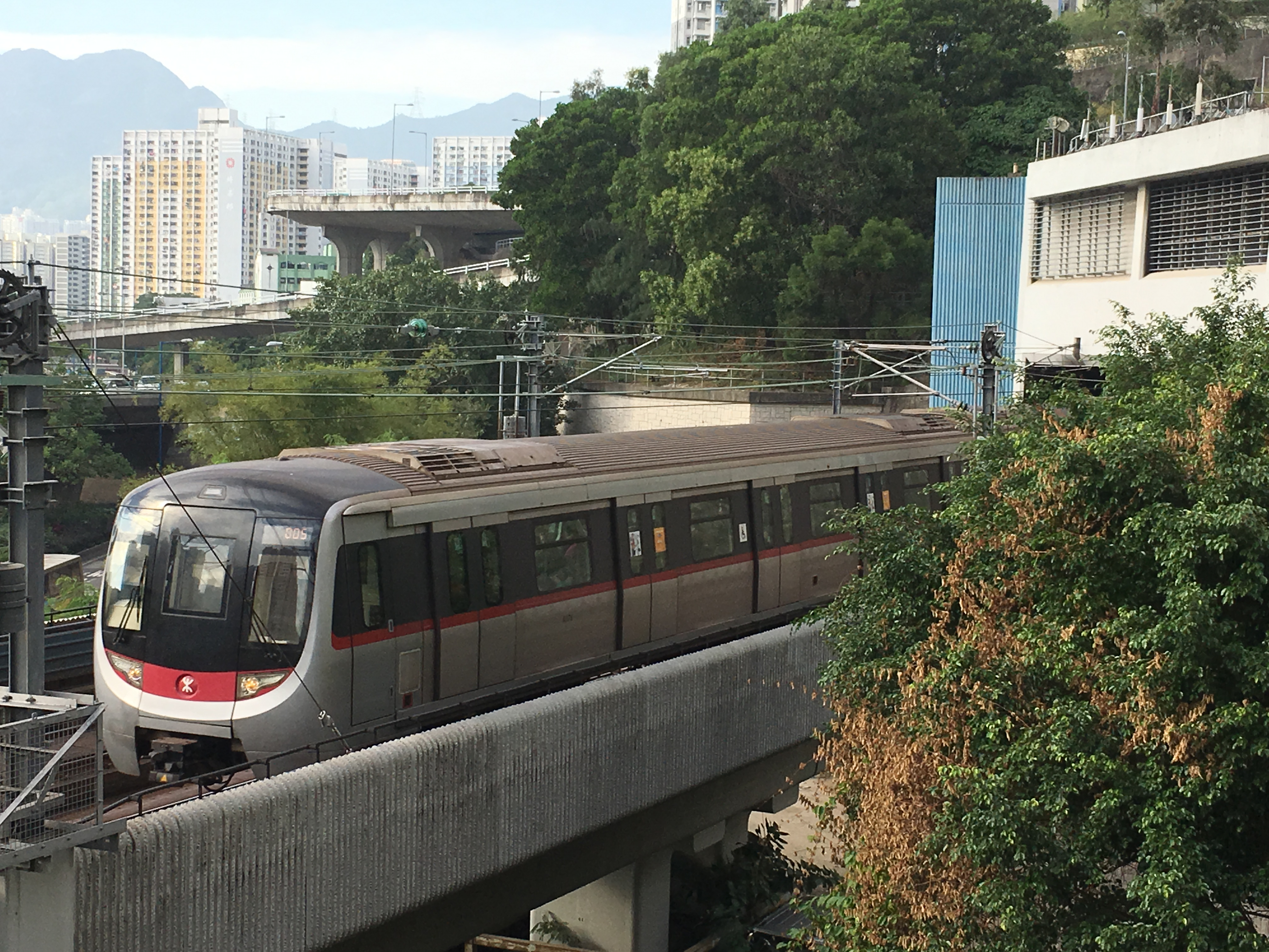 This photo is taken in Kowloon Bay.